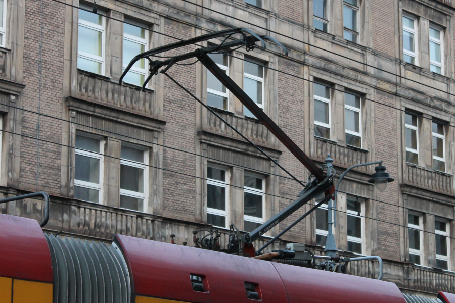 Pantograf tramwajowy typu 70EC produkcji EC Engineering zamontowany na dachu tramwaju Pesa Swing typu 120Na o numerze bocznym 3146 należącym do Tramwajów Warszawskich.